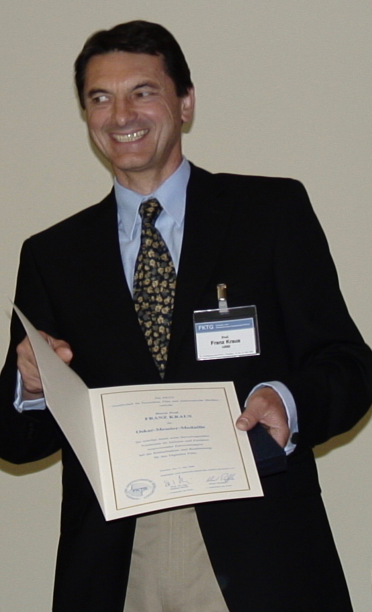 Franz Kraus erhält die Oskar-Messter-Medaille für "hervorragende Verdienste als Initiator und Förderer des digitalen Films."